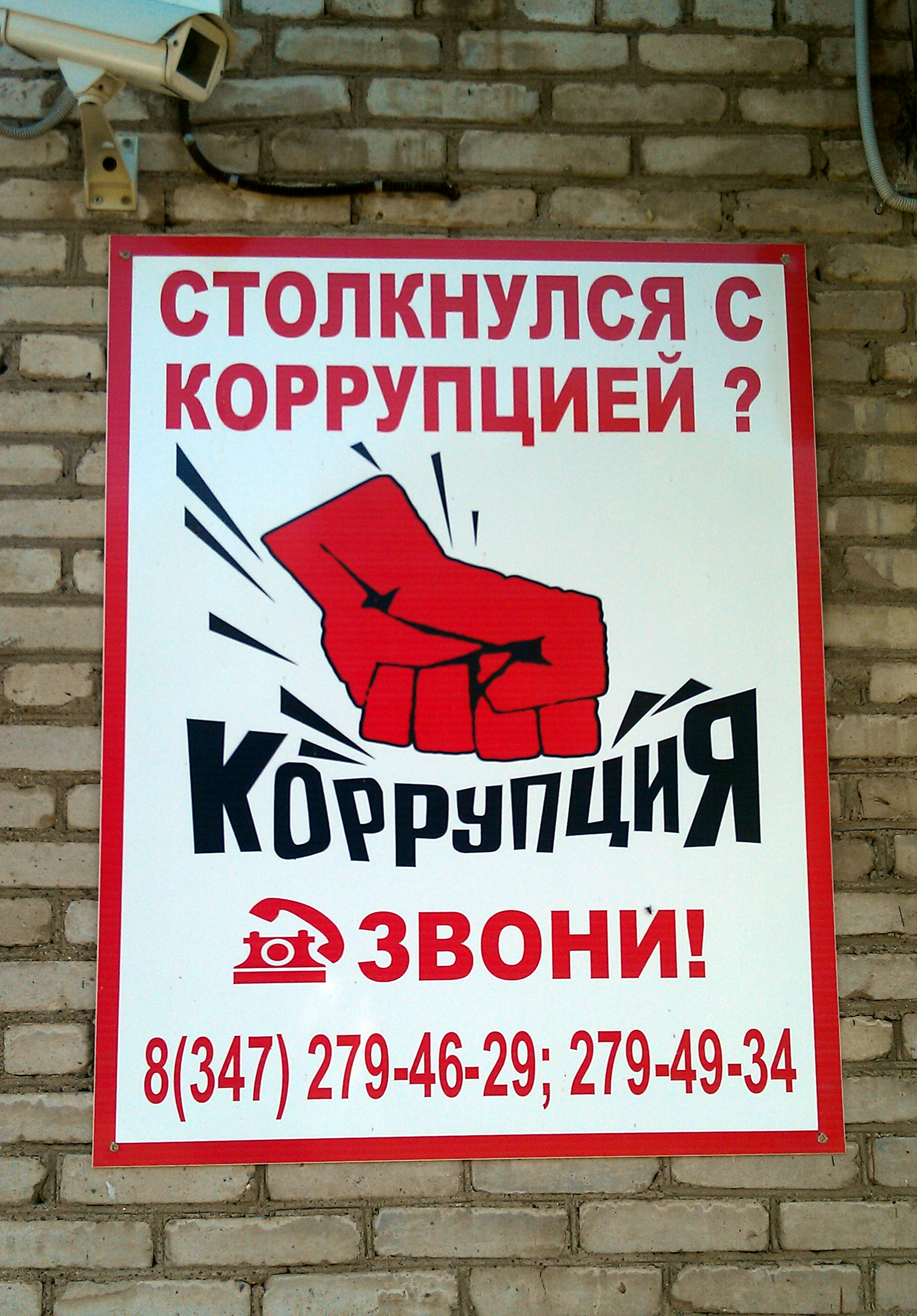 Столкнулся с коррупцией !?